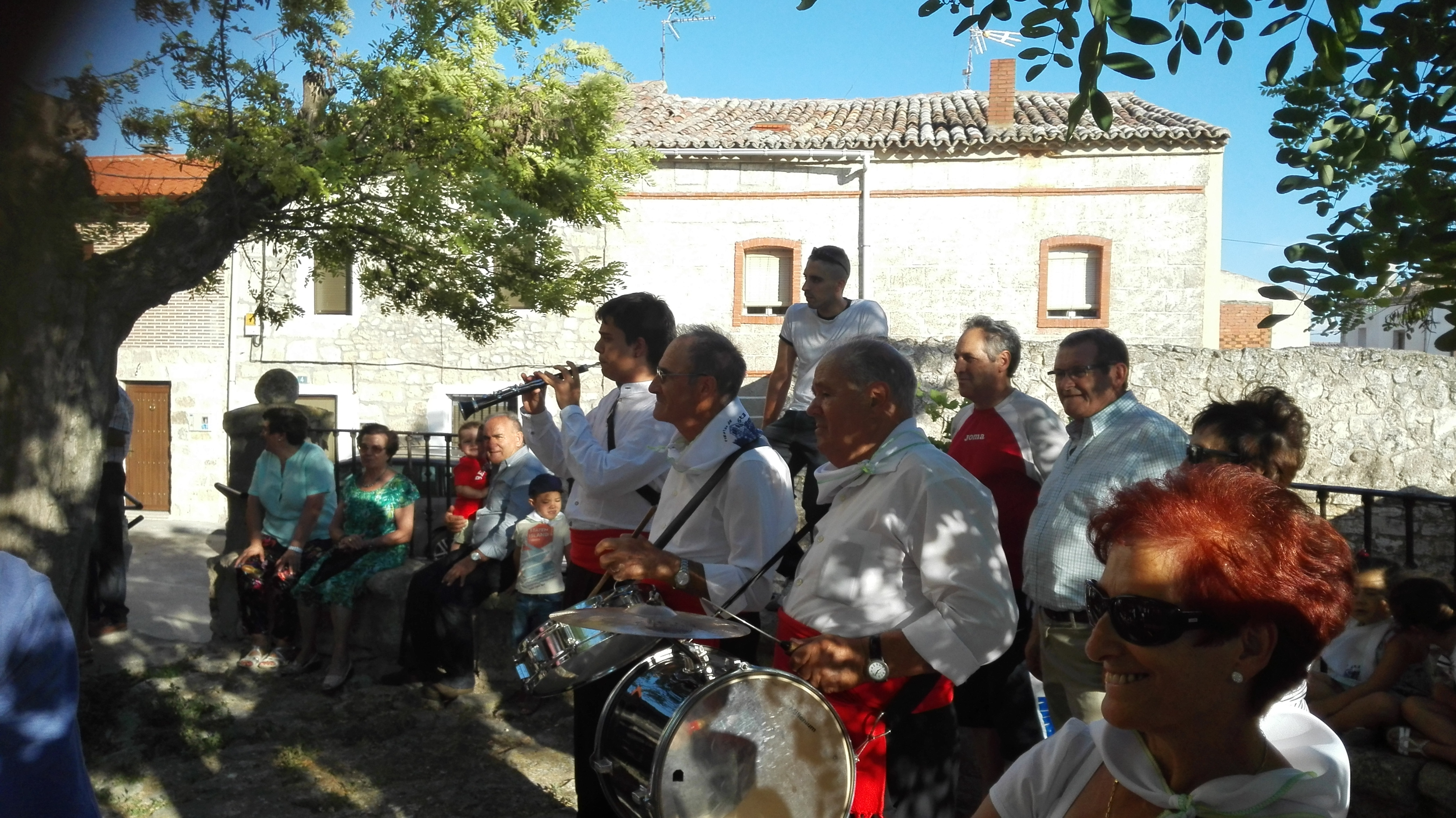 Músicos dulzaineros acompañando a la danza de Villahán (Palencia, España)